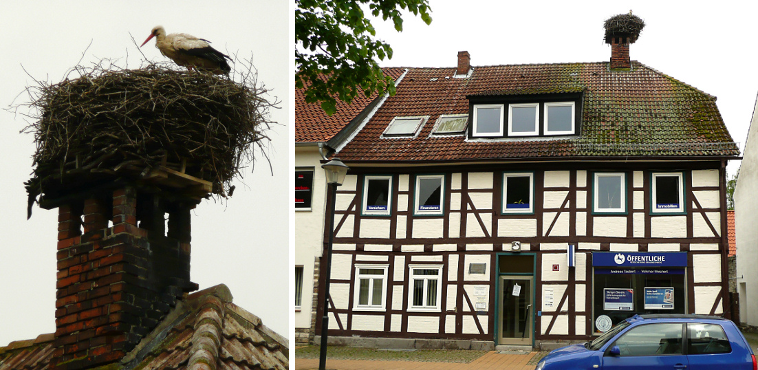 Vorsfelder Storch